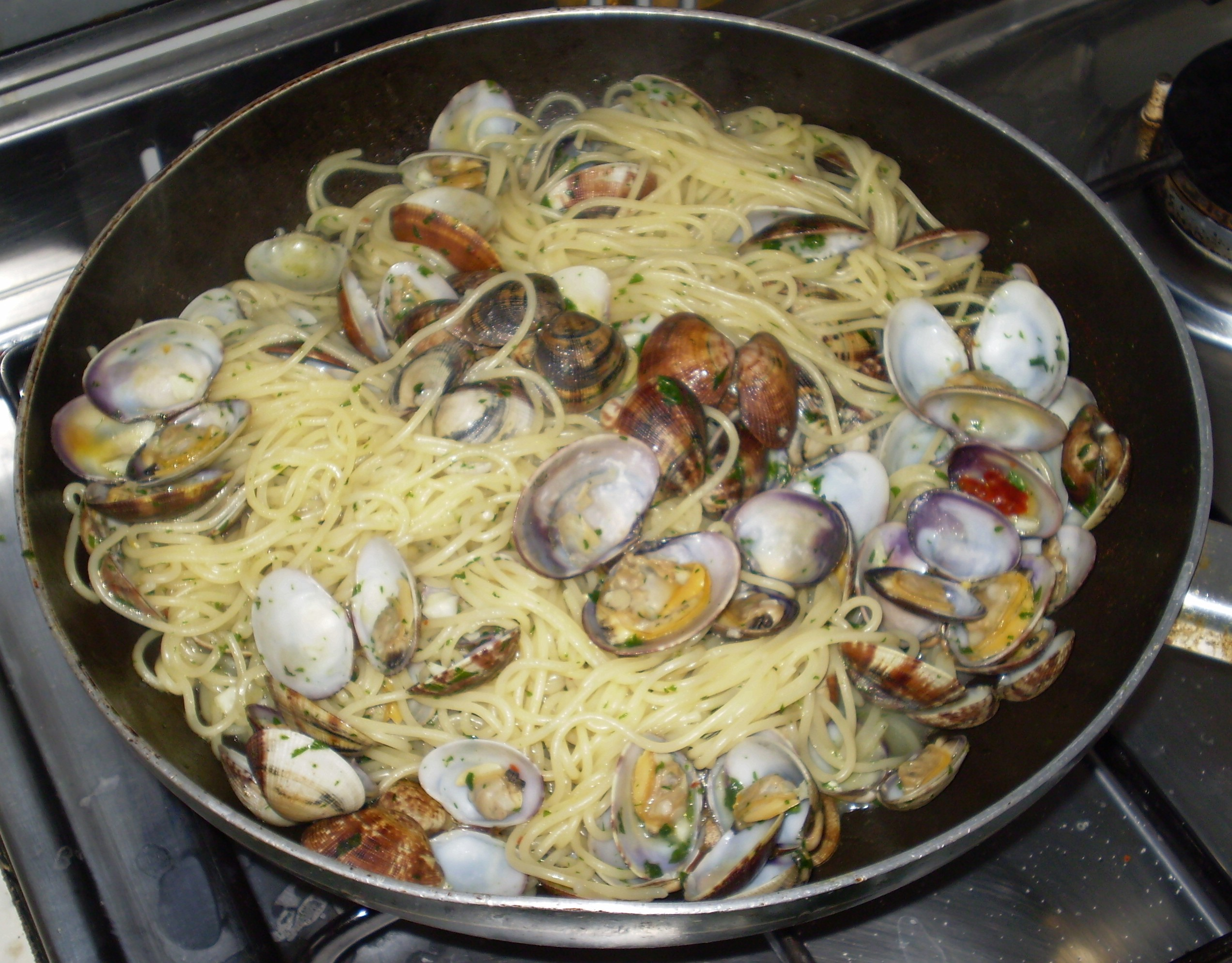 Spaghetti alle vongole Own photo